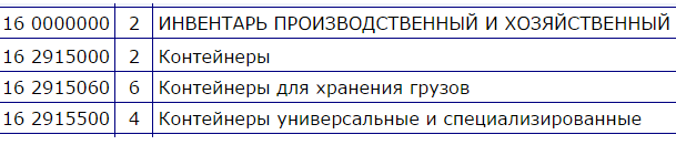 ОКОФ. Контейнер для мусора